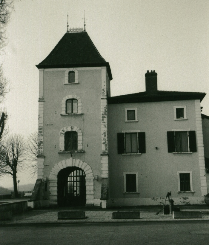 Tour la plus ancienne du château de sainte-croix ain France. Photo prise vers 1990, par l'auteur de l'article wikipédia sur ste-croix.